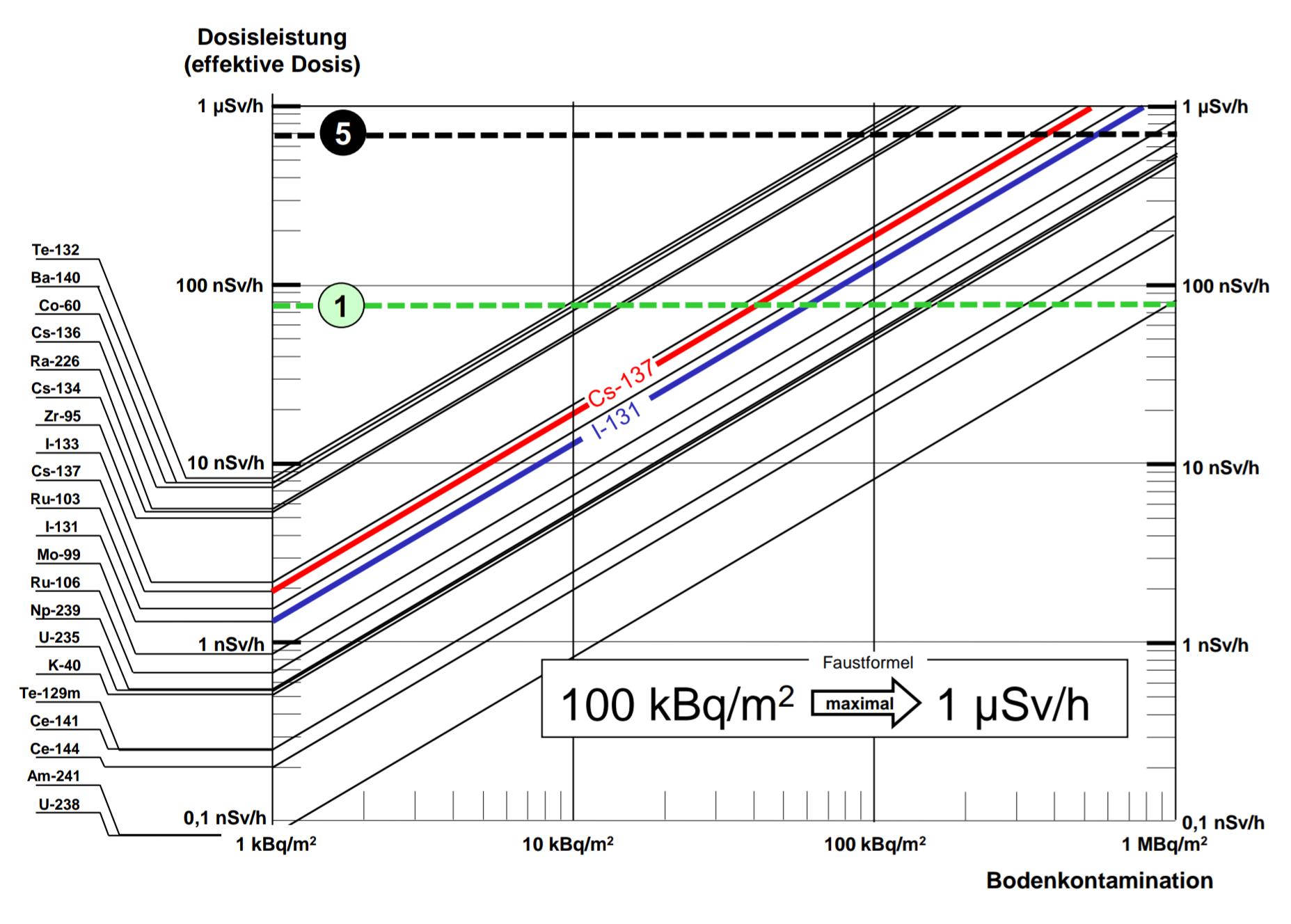 Dosisleistung (effektive Dosis) bei bekannter Bodenkontamination für ausgewählte Radionuklide (Personen über 17 Jahren)